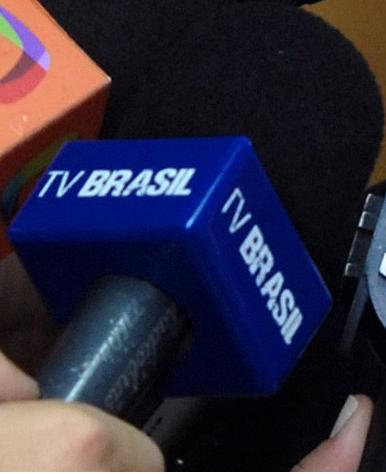 Detalhe de um microfone da emissora de televisão brasileira TV Brasil.